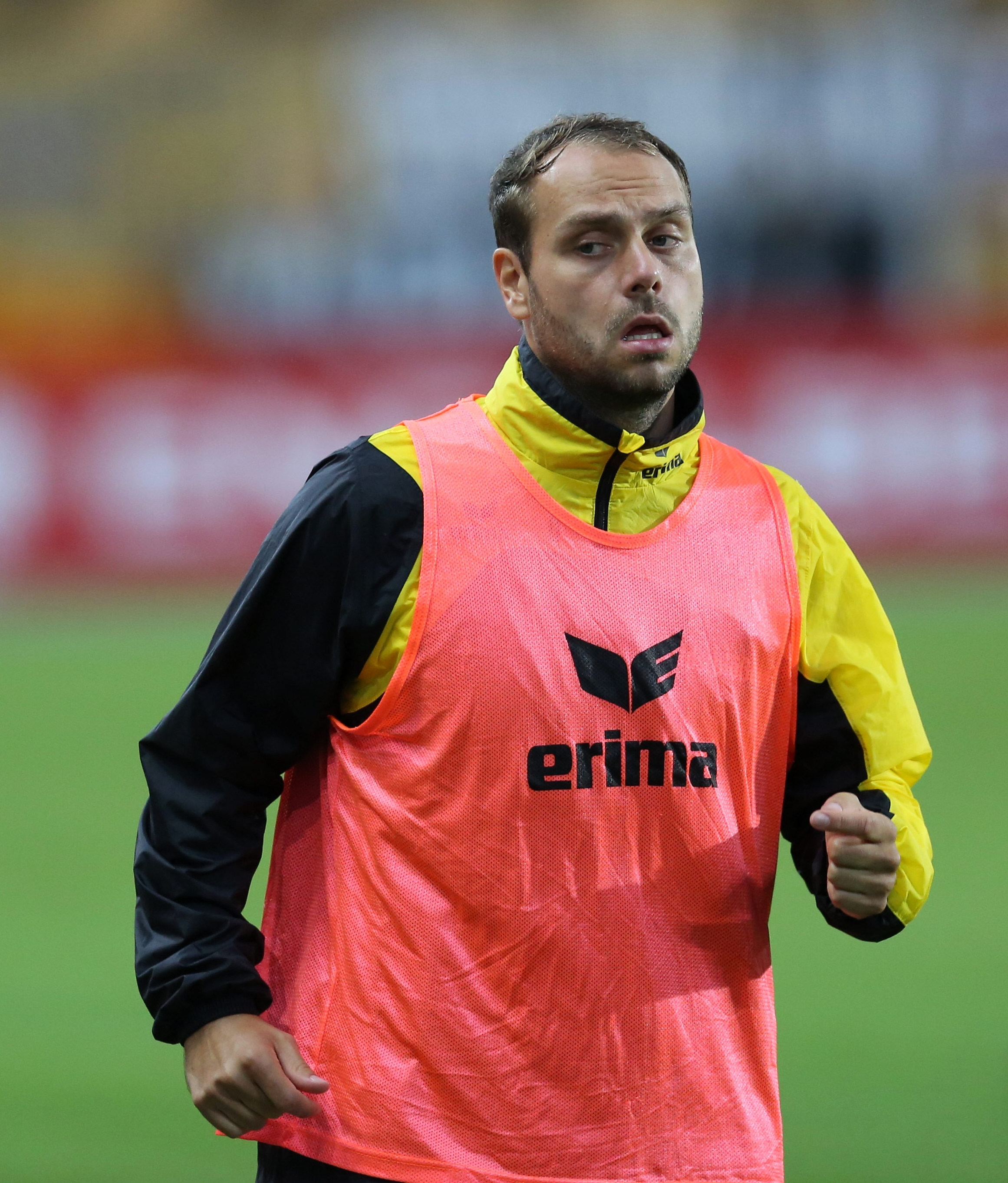 DFB-Pokal 2017/18, 1. Hauptrunde, TuS Koblenz gegen SG Dynamo Dresden: Rico Benatelli (SG Dynamo Dresden)